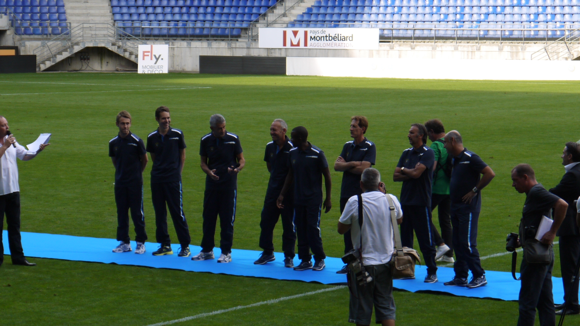 Le staff qui débutera la saison 2013/14